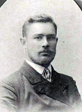 Константин Иванович Молодцов (иногда Молодцев[1]; 20 мая 1873, Тобольская губерния — после 1912) — крестьянин, волостной писарь, депутат III Государственной думы от Тобольской губернии (1907—1912).